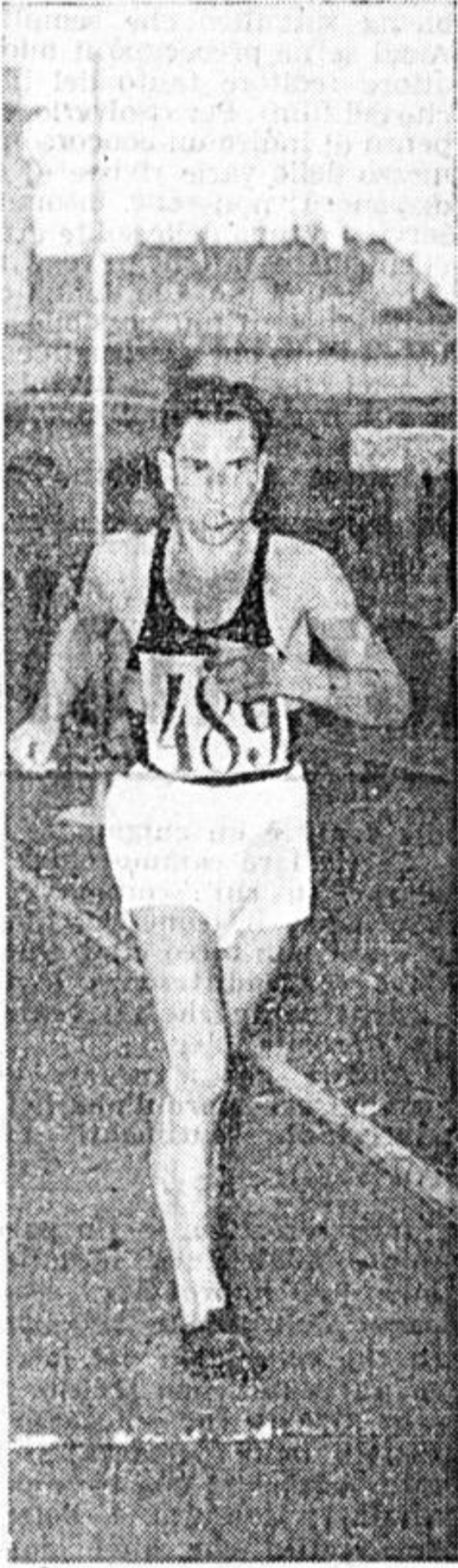 L'atleta Valentino Manzutti nel 1951